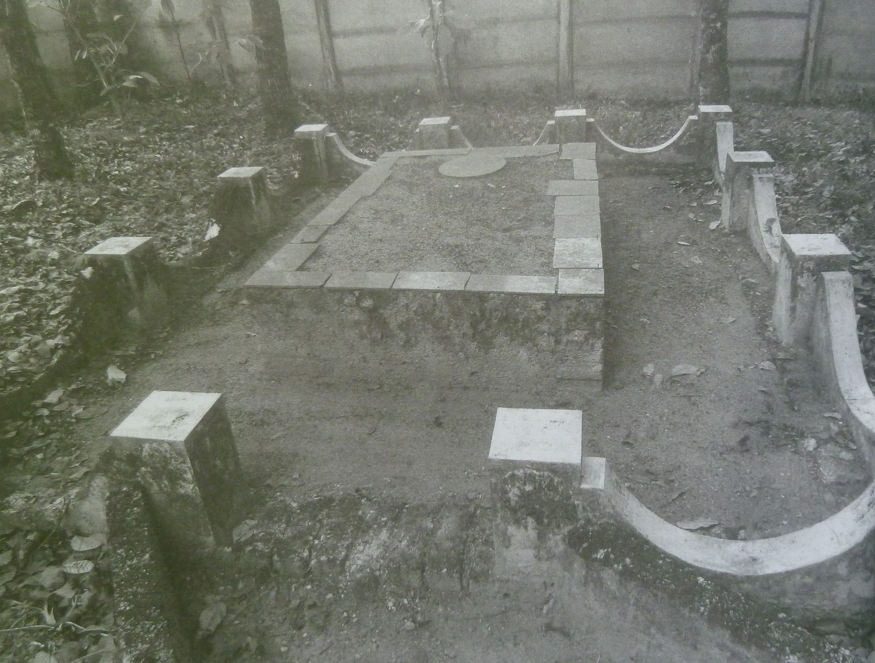 വി. ആർ. കൃഷ്ണനെഴുത്തച്ഛന്റെ സമാധി